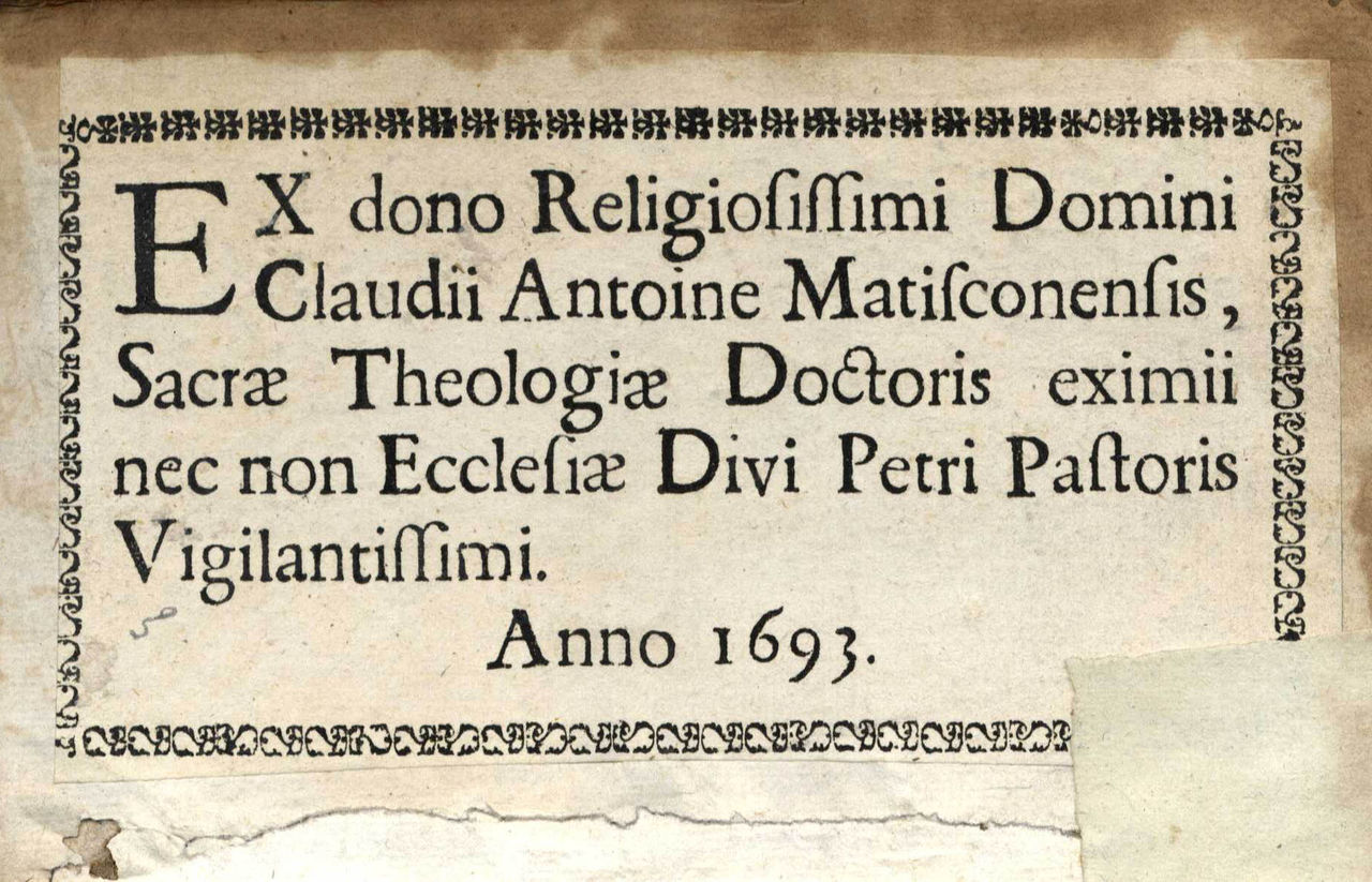 Exemple d'ex-dono imprimé. Ici, le prêtre Antoine Claude cède son livre au collège de Mâcon.